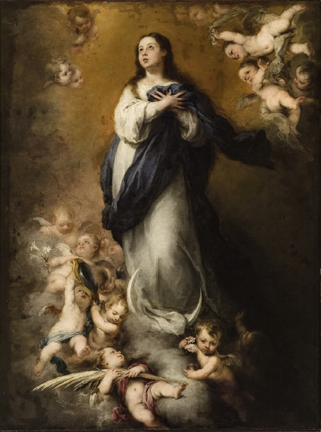 Esta obra es una de las cuatro Inmaculadas de Bartolomé Esteban Murillo, que se caracterizan porque la Virgen María aparece siempre vestida con una tunica blanca, un manto Azul y con la luna a sus pies, que se conservan en el Museo de Bellas Artes de Sevilla, la ciudad natal del pintor.